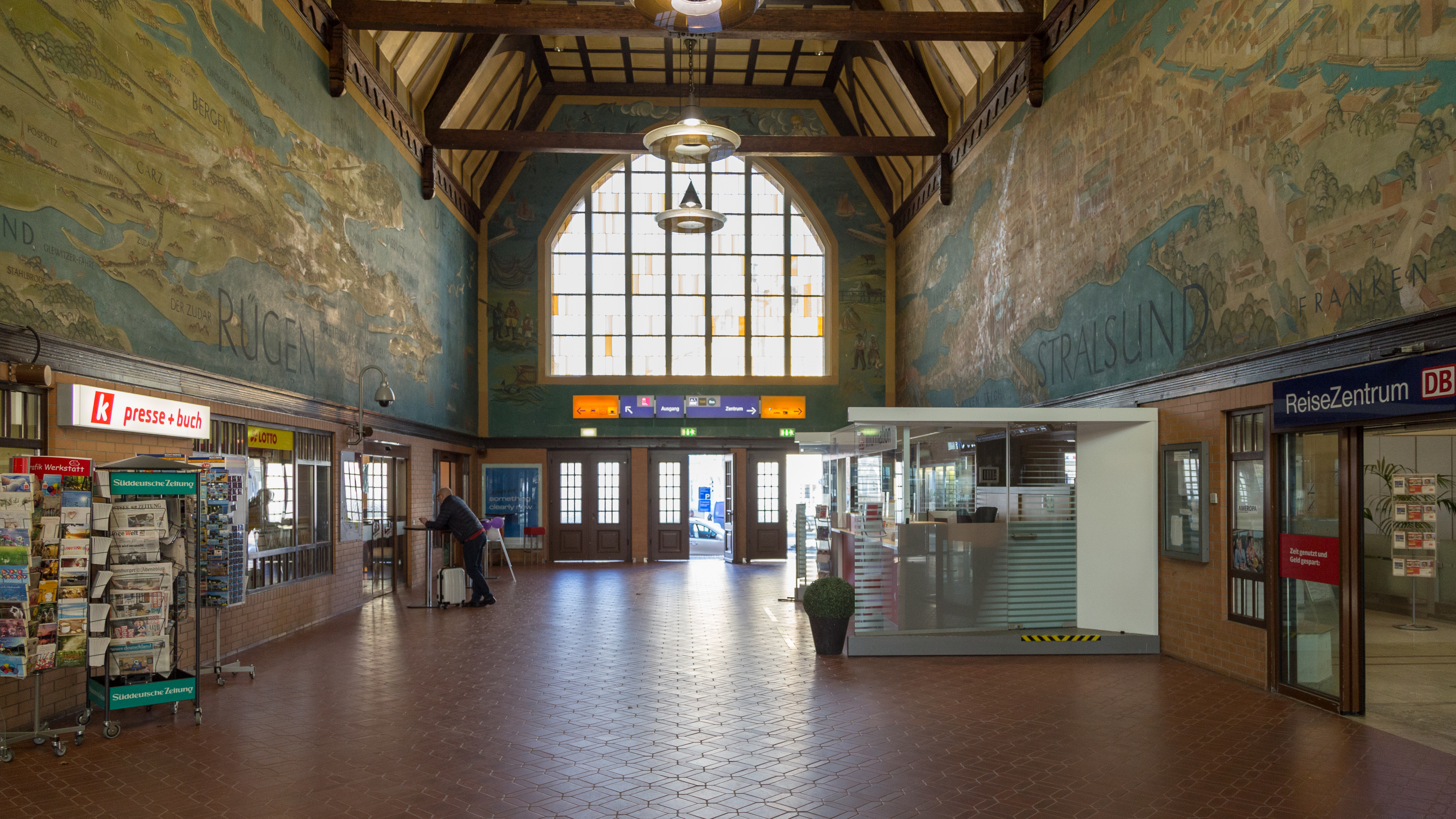 Empfangsgebäude des Hauptbahnhofs Stralsund